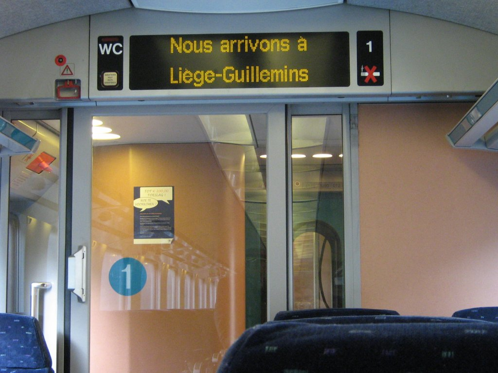 Afficheur SIV dans une voiture I11 de la SNCB.